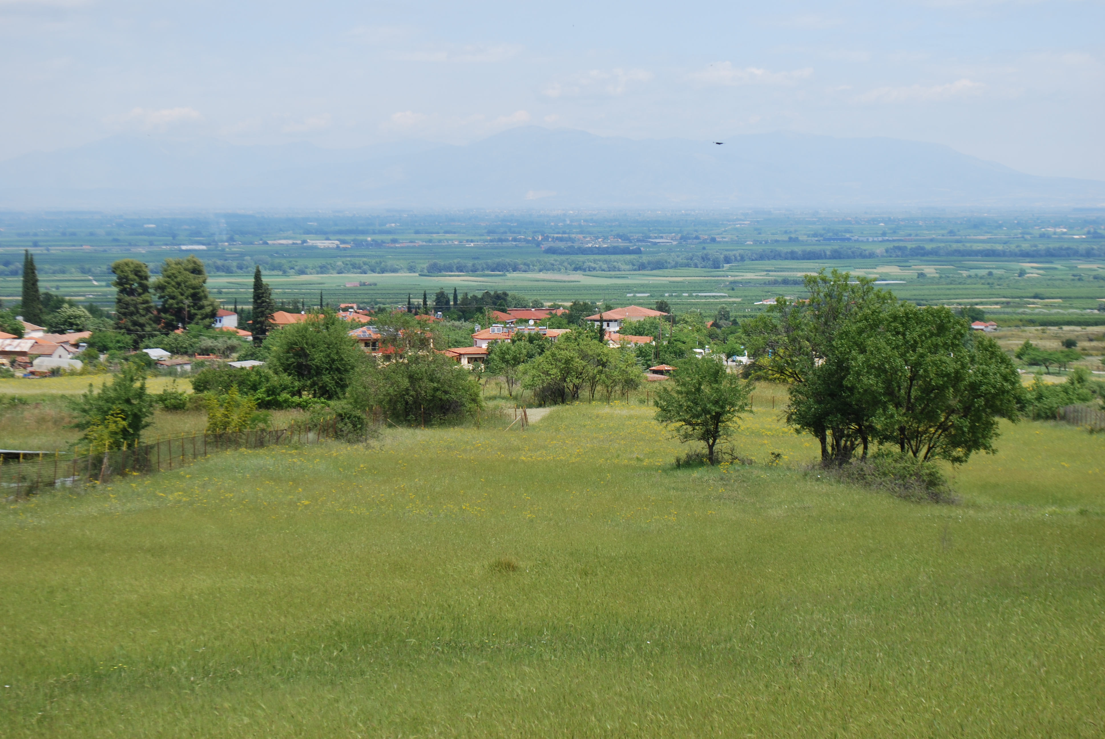 Vue de Vergina.